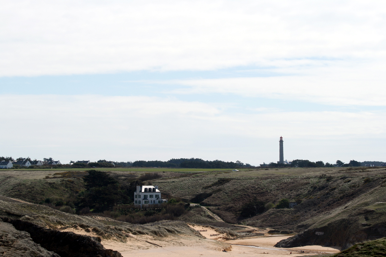 Ancien hotel de Donnant